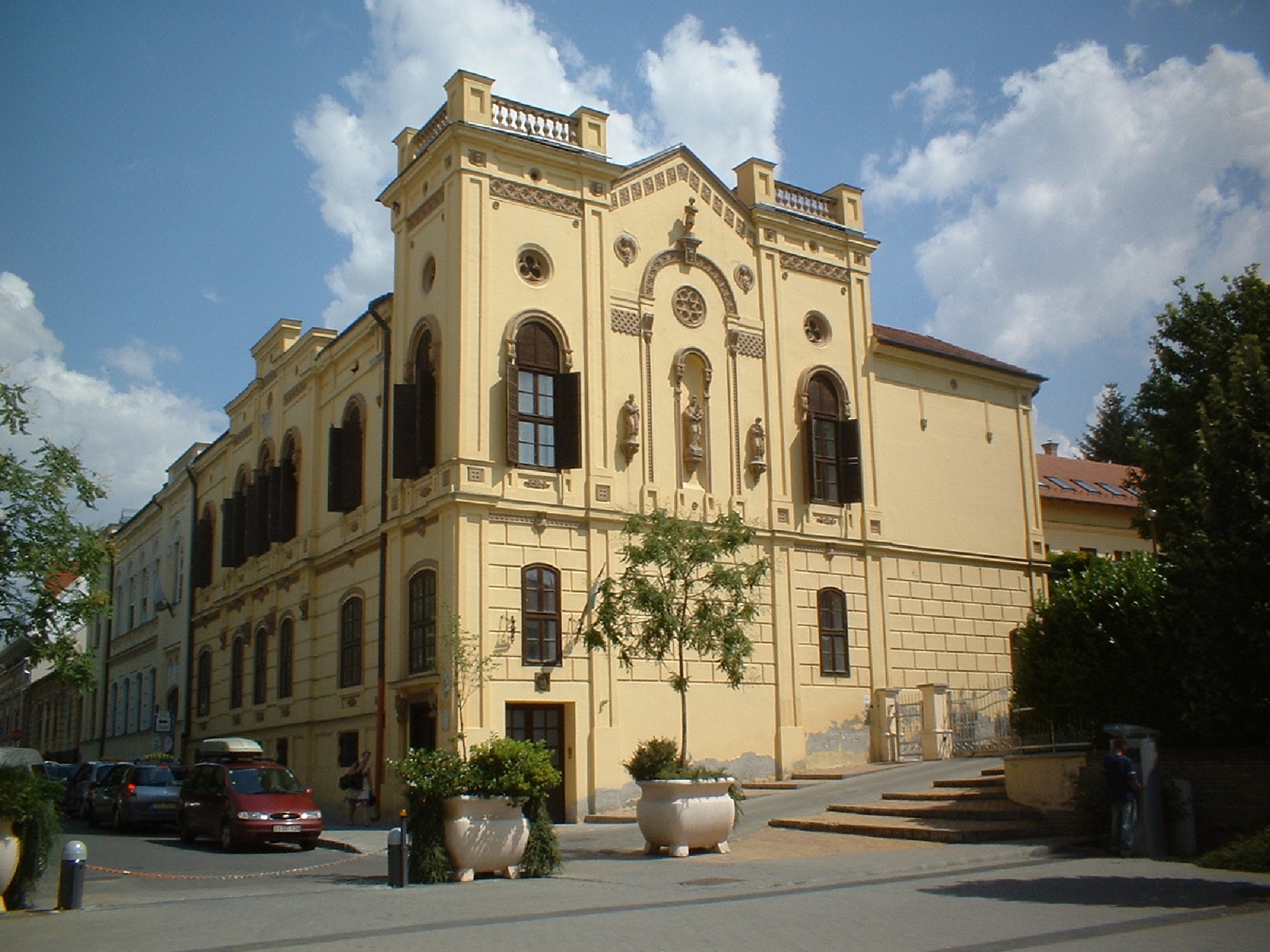 Zárda-épület (Kaposvár, Zárda u. 4 .) This is a photo of a monument in Hungary. Identifier: 7932